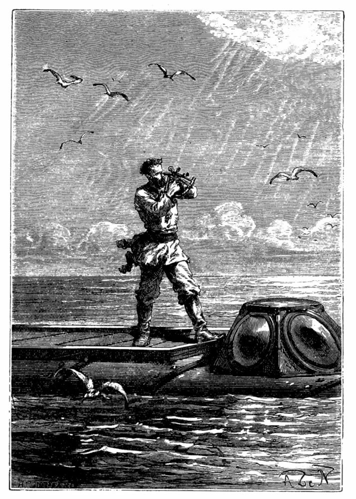 Kapitän Nemo nimmt den Höhenstand der Sonne auf.